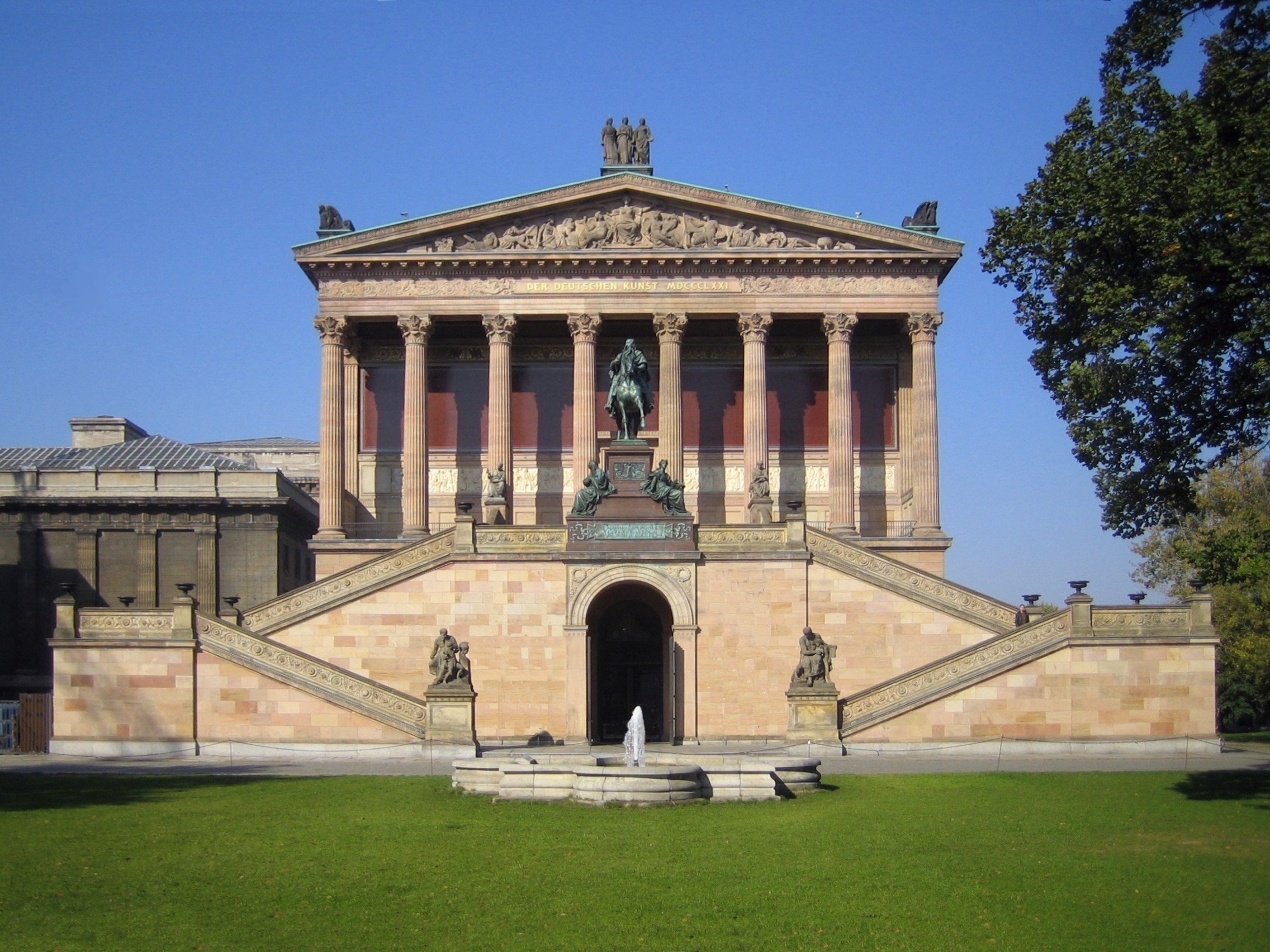 Berlin-Mitte. Die Alte Nationalgalerie